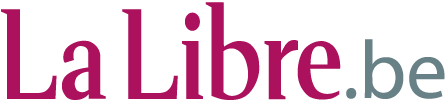 Logo von